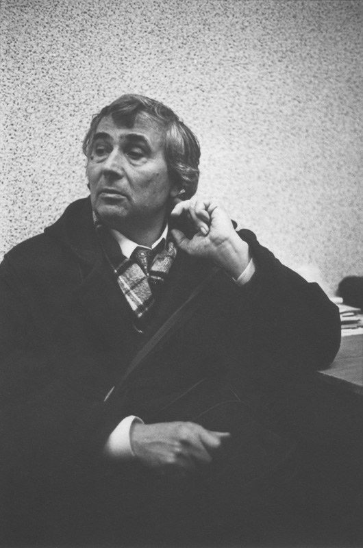 Moldavian actor to Dumitru Fusu (90-ies).